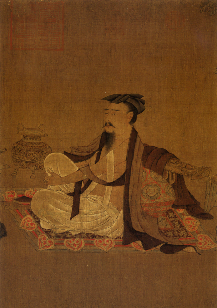 Portrait d'un lettré hautement affranchi. Peut-être le poète Ruan Ji, du groupe des "Sept Sages de la forêt de bambous". Détail d'un rouleau vertical, encre et couleurs sur soie. Attribué à Sun Wei (seconde moitié du IXe siècle). Musée de Shanghai. Scan tiré de La peinture chinoise, Emmanuelle Lesbre et Liu Jianlong, Editions Hazan, 2004, illustration 1, page 13. Peinture commentée par Emmanuelle Lesbre page 19.